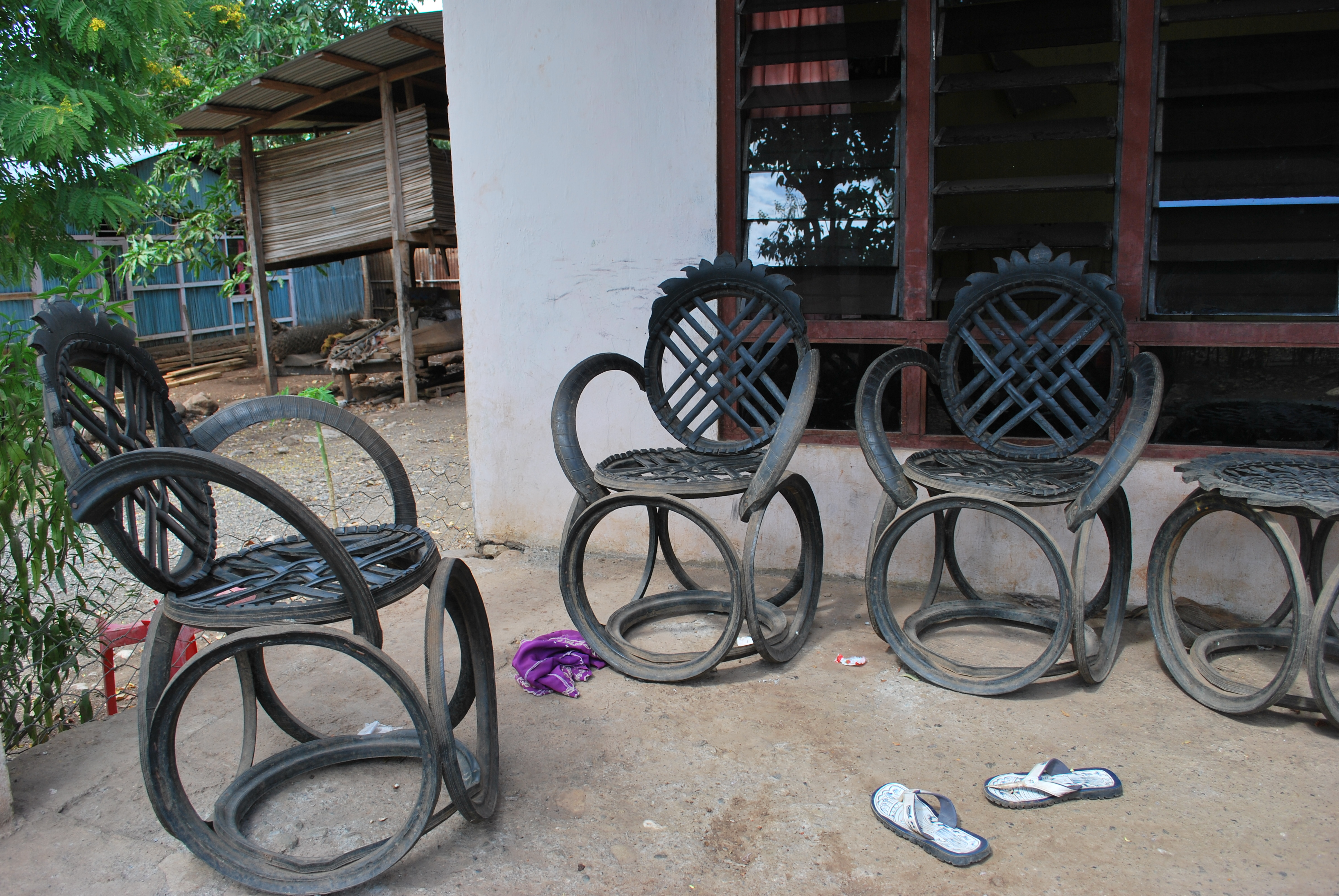 Die Möbel wurden aus alten Felgen gemacht (Osttimor)